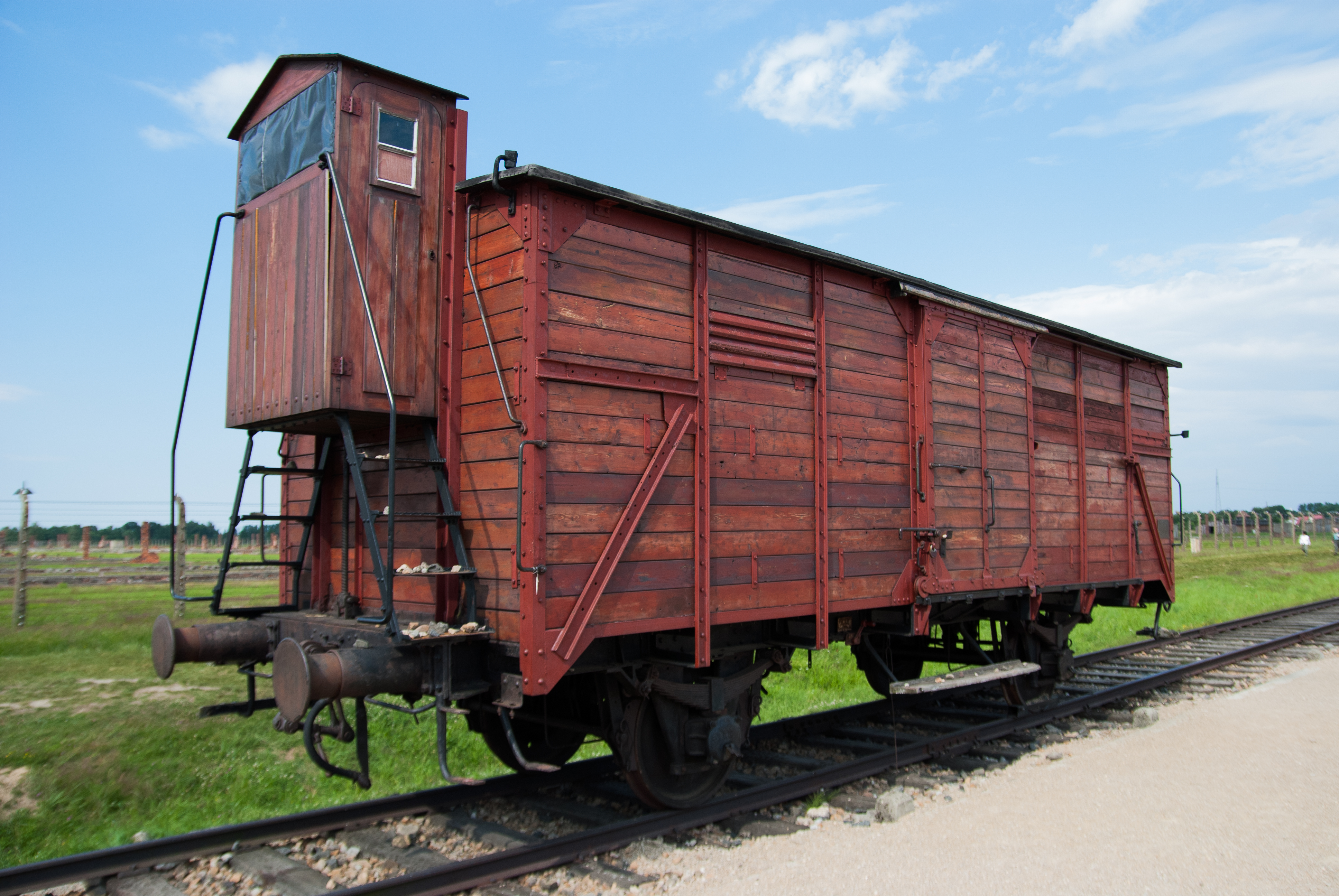 Bild på den järnvägsvagn som finns på Birkenau.